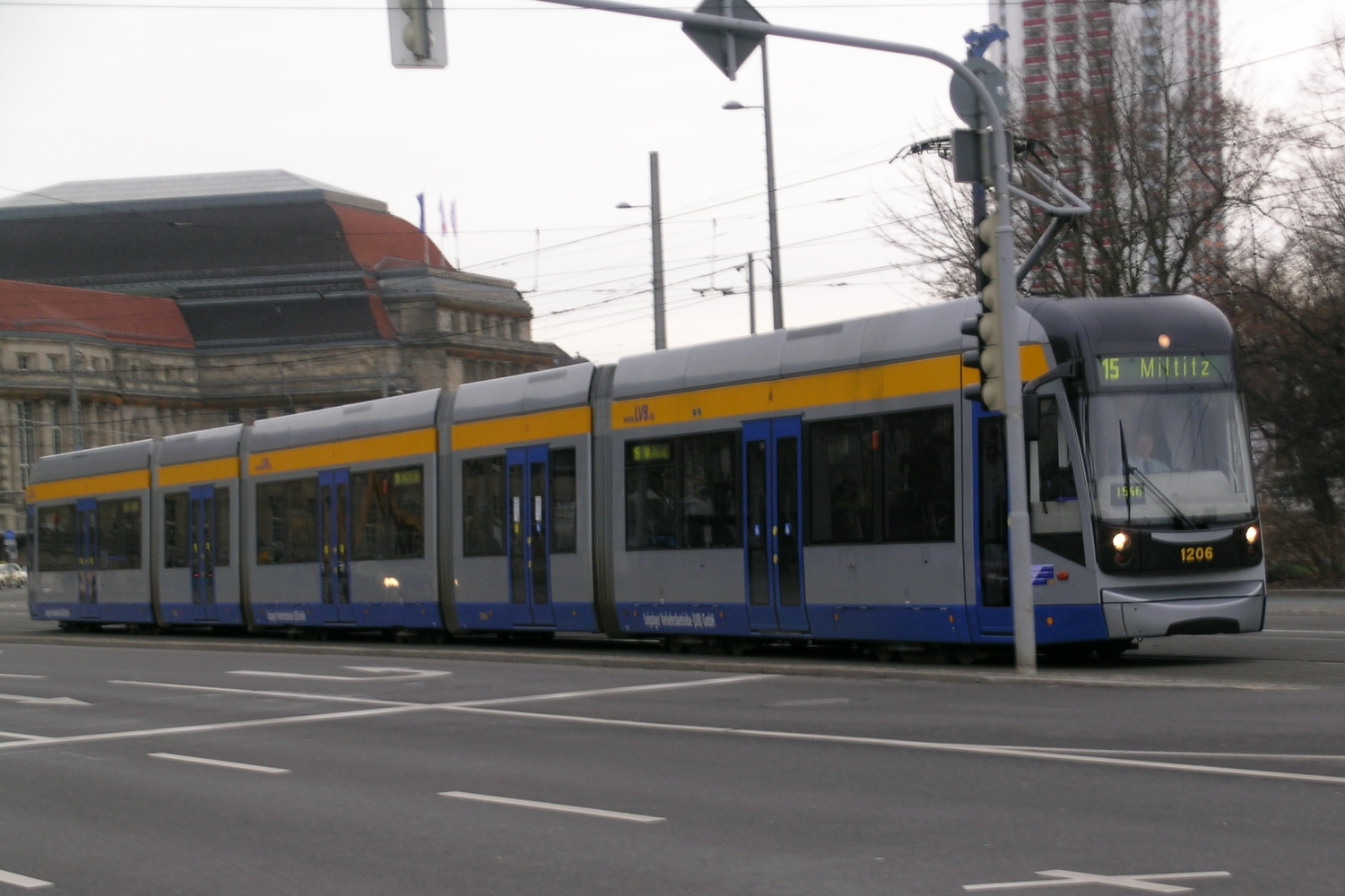 Das Bombardier Classic XXL NGT12-LEI-Straßenbahnfahrzeug am Willy-Brandt-Platz bei Tröndlinring